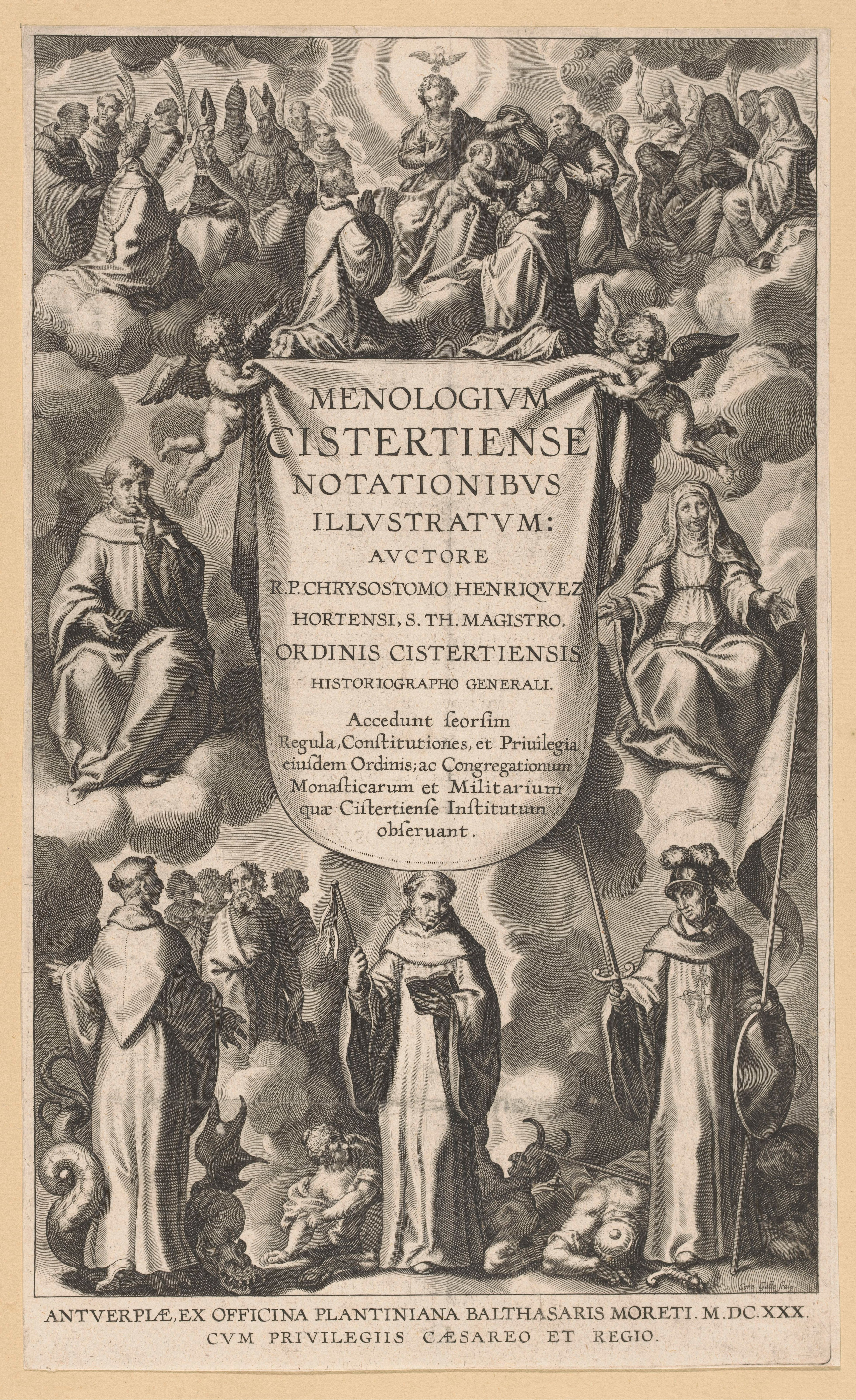 IdentificatieTitel(s): Allegorische titelpagina met Cisterciënzer heiligenTitelpagina voor: Chrysostomus Henriquez, Menologium Cistertiense Notationibus illustratum, Antwerpen, 1630Objecttype: prent titelpagina Objectnummer: RP-P-OB-6929Opschriften / Merken: verzamelaarsmerk, verso, gestempeld: Lugt 240Omschrijving: Twee engelen houden een doek met de titel van het boek. Erboven Maria met kind en de Heilige Geest in de gedaante van een duif omringd door heiligen. Aan weerszijden van het doek een mannelijke en een vrouwelijke Cisterciënzer heilige. Onder drie staande Cisterciënzers. De linke stapt met zijn voet op een draak, de middelste houdt een gezel vast, de rechte draagt een zWaar: d en een vaandel.VervaardigingVervaardiger: prentmaker: Cornelis Galle (I) (vermeld op object)uitgever: Balthasar Moretus (I) (vermeld op object)verlener van privilege: Ferdinand II (Duits keizer) (vermeld op object)Plaats vervaardiging: prentmaker: Zuidelijke Nederlandenuitgever: AntwerpenDatering: 1630Fysieke kenmerken: gravureMateriaal: papier Techniek: graveren (drukprocedé)Afmetingen: blad: h 332 mm × b 200 mmToelichtingTitelpagina voor: Chrysostomus Henriquez, Menologium Cistertiense Notationibus illustratum, Antwerpen, ex officina Plantiniana, B. Moretus, 1630.OnderwerpWat: monastic orders, monastic life: CisterciansheiligenMadonna: i.e. Mary with the Christ-child (+ Holy Ghost (as a dove))Verwerving en rechtenVerwerving: overdracht van beheer 1816Copyright: Publiek domein